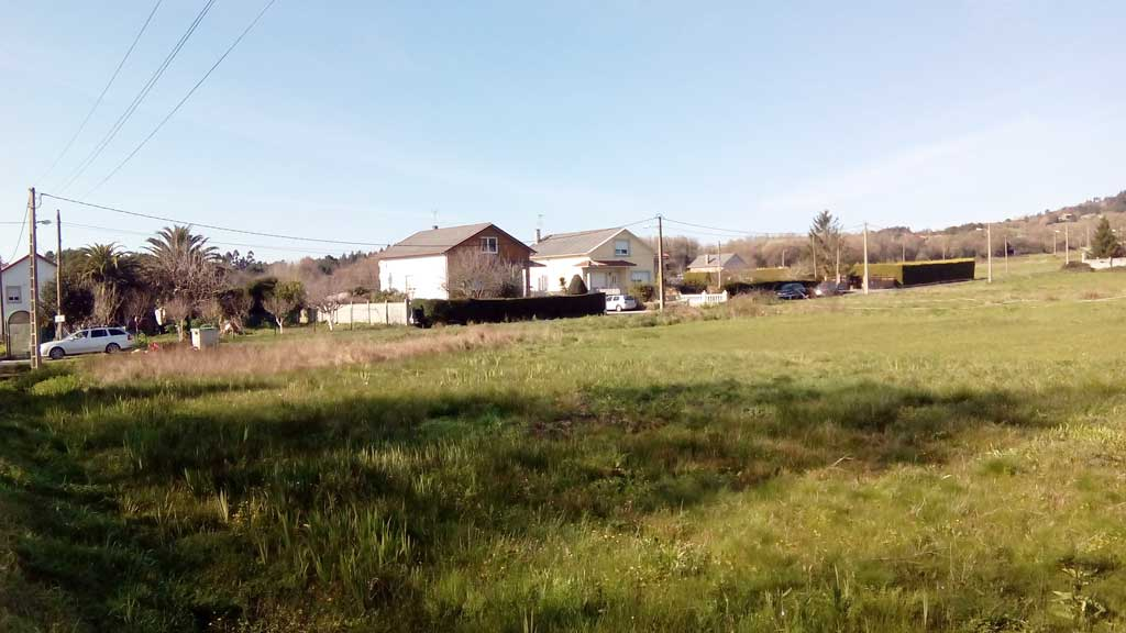 Vista da Gándara, Sedes.